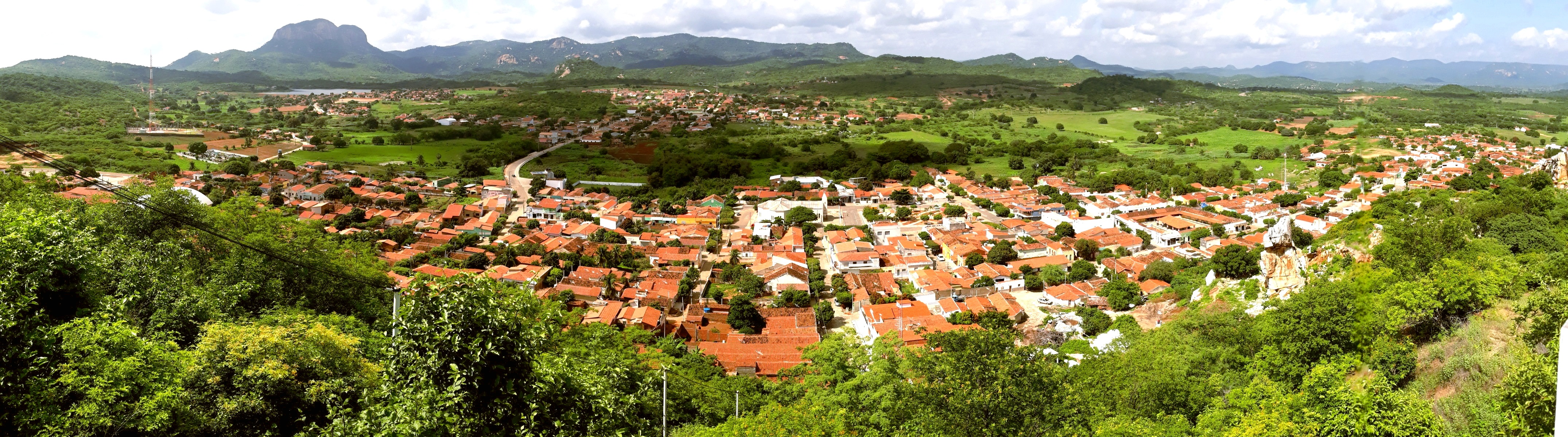 Panorama da cidade de Almino Afonso, Rio Grande do Norte (Brasil), a partir do Mirante e Santuário São José